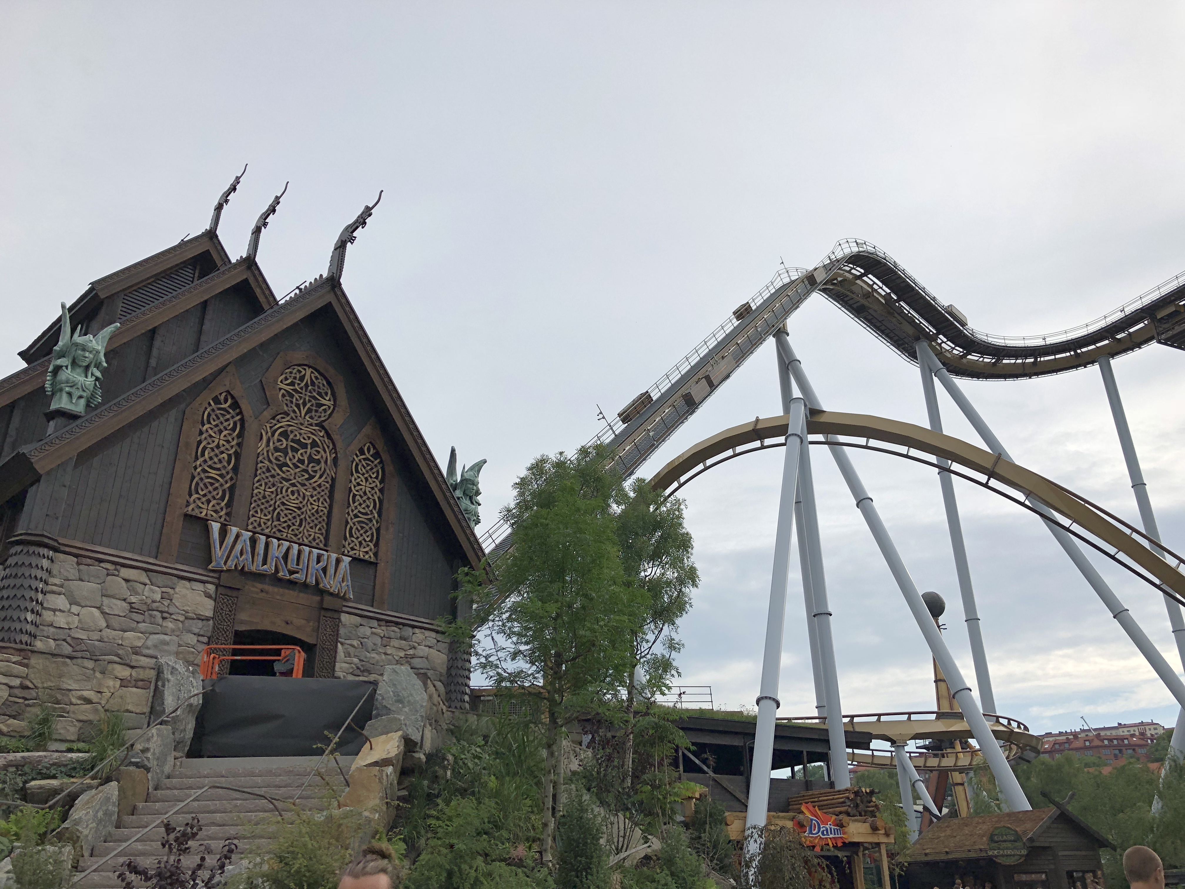 Berg- och dalbanan Valkyria på Liseberg innan öppningen.